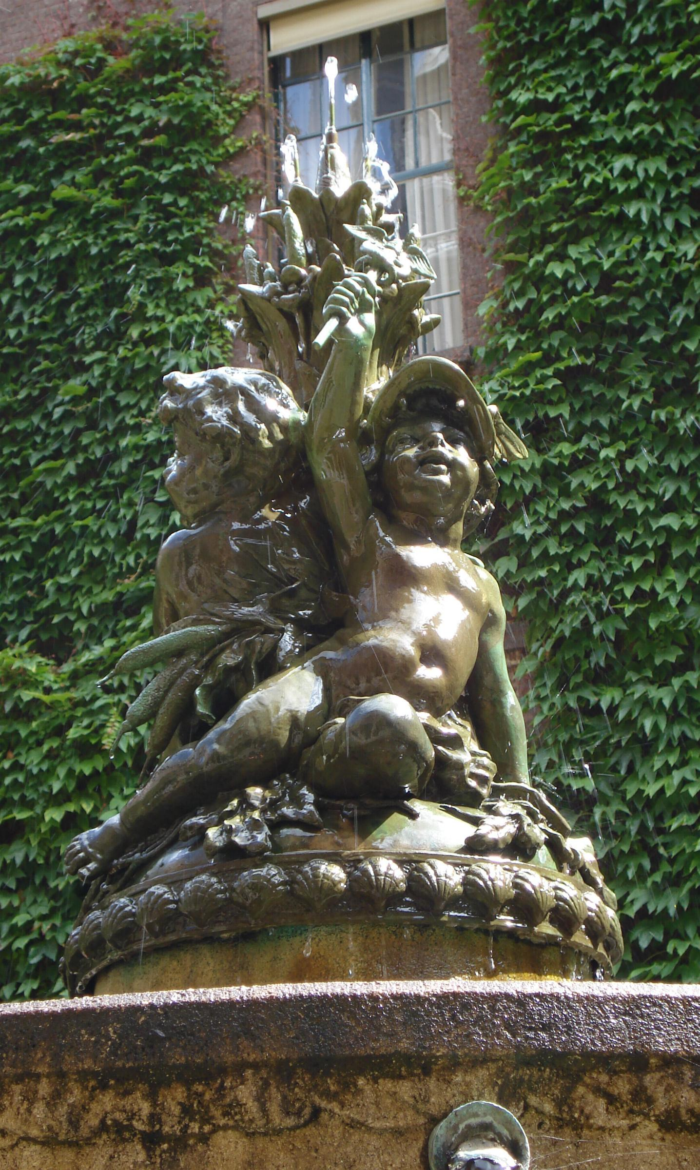 Rotterdam, stadhuistuin. Fontein van Simon Miedema. Rotterdam/The Netherlands.